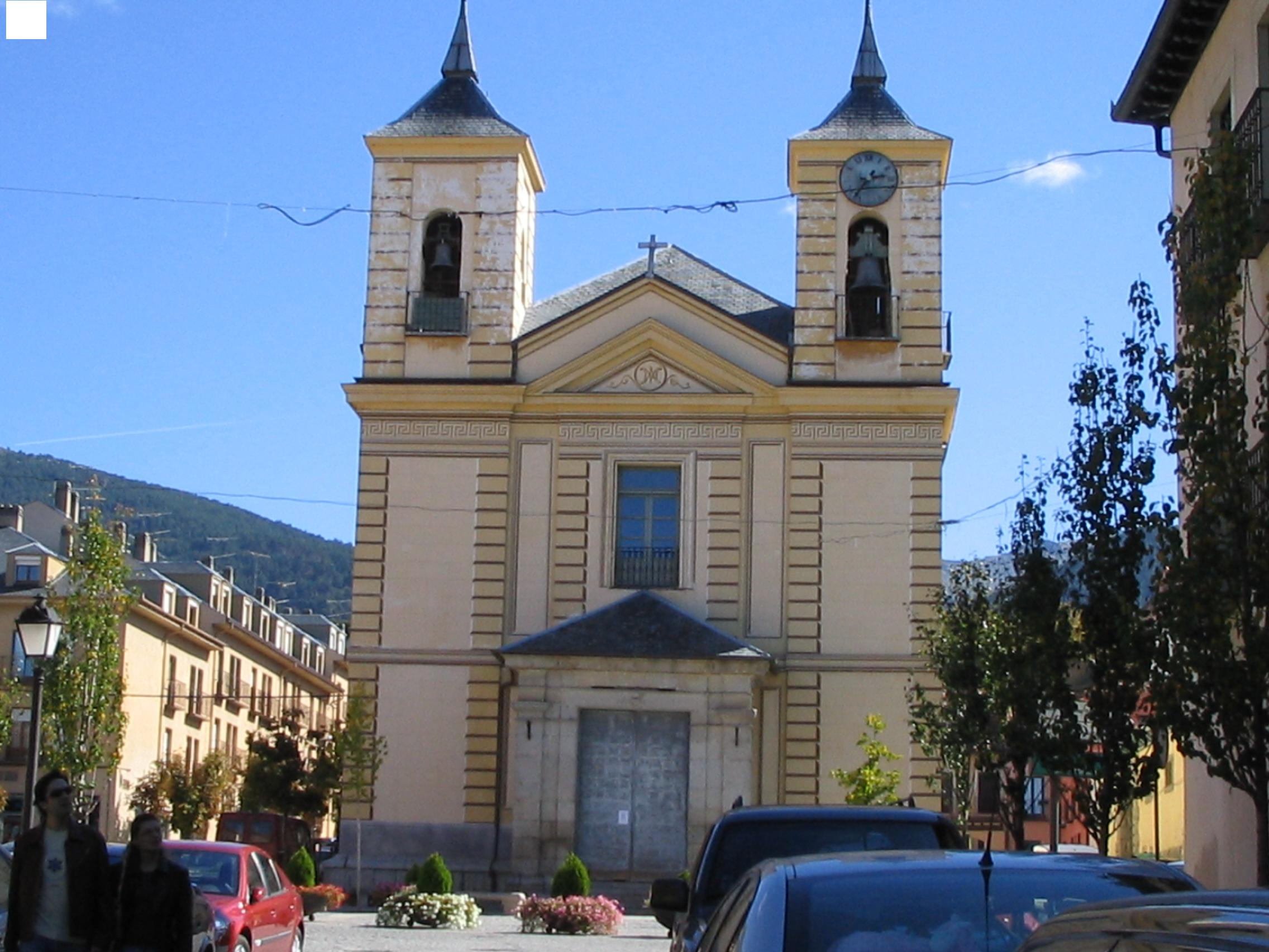 Catedral de La Granja (Segovia)